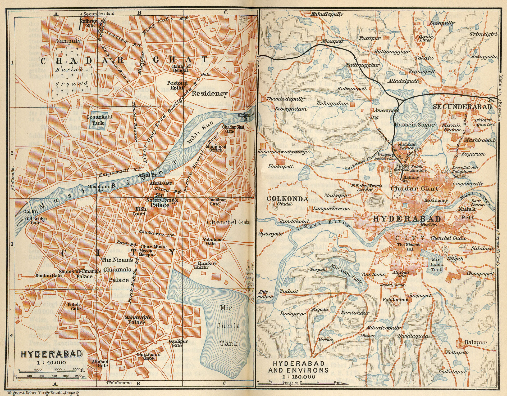 Hyderabad map 1914